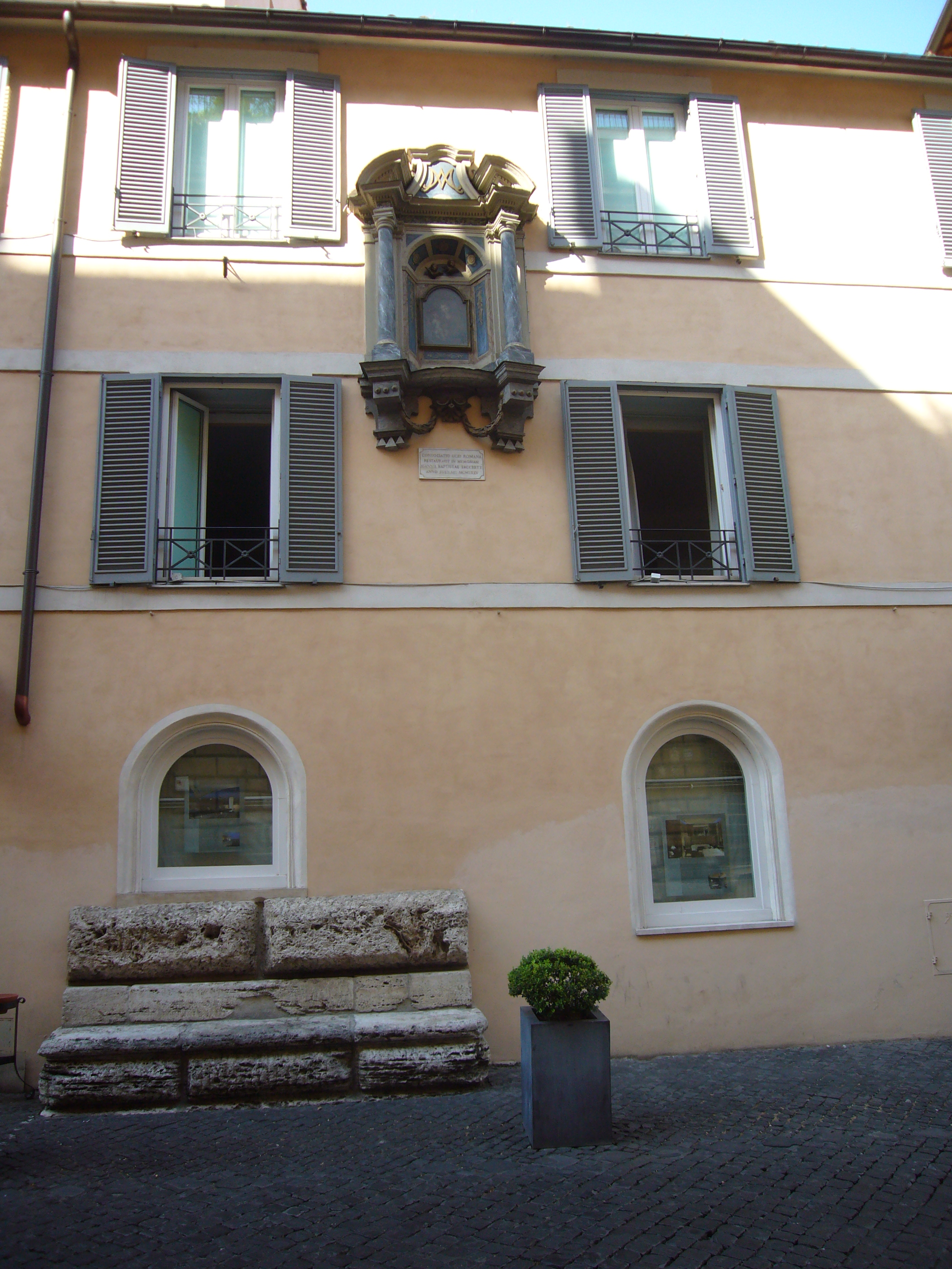 Roma, madonna delle Grazie ai tribunalii di via Giulia